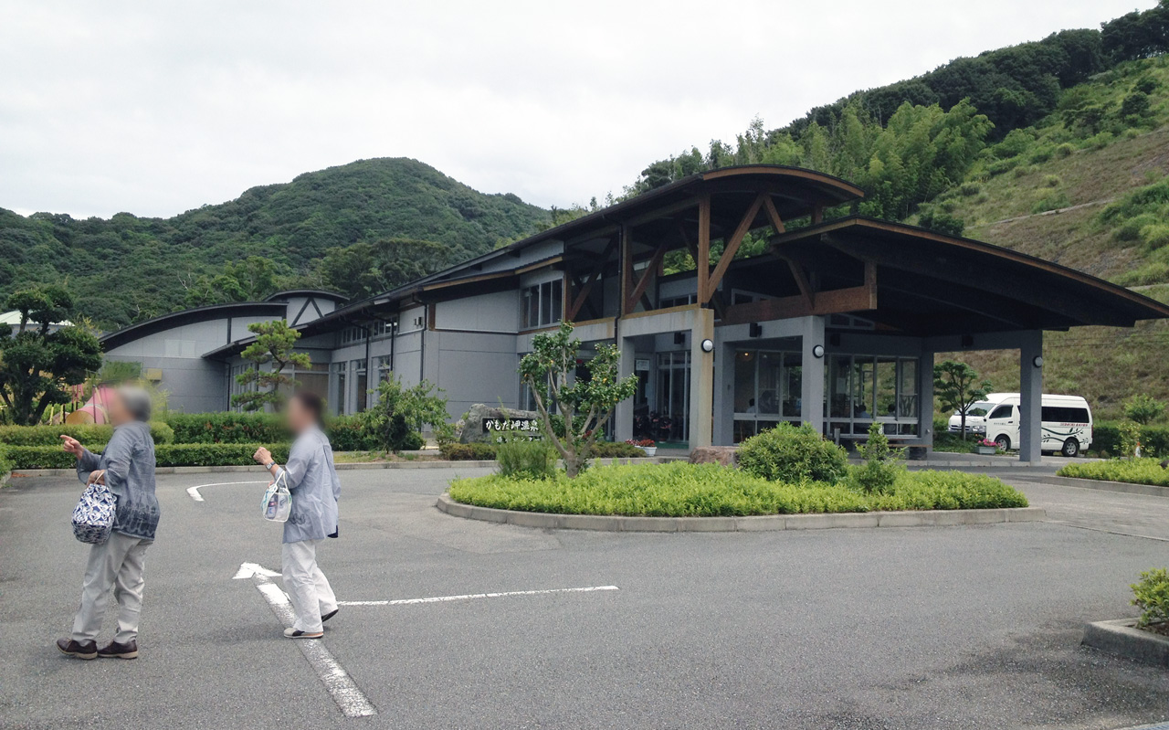 阿南市かもだ岬温泉保養センター